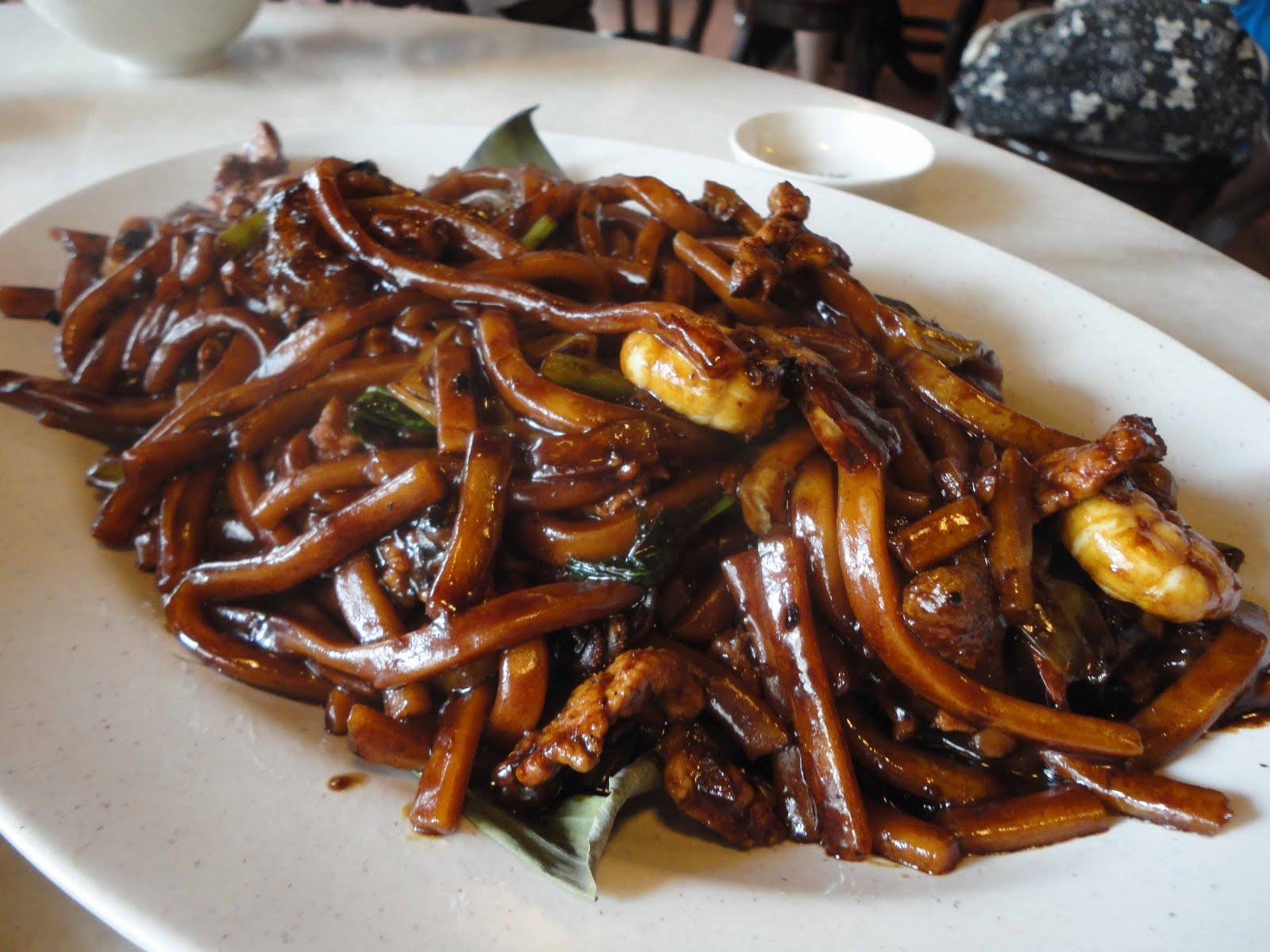 KL hokkien mee